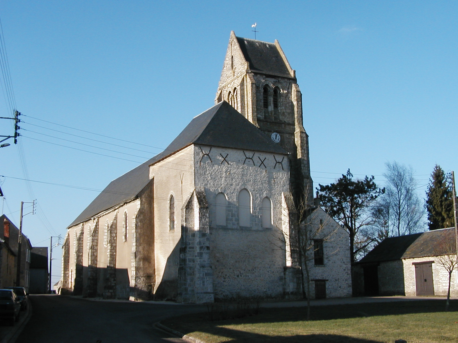 Chevet de l'église de Rouvray-Saint-Denis